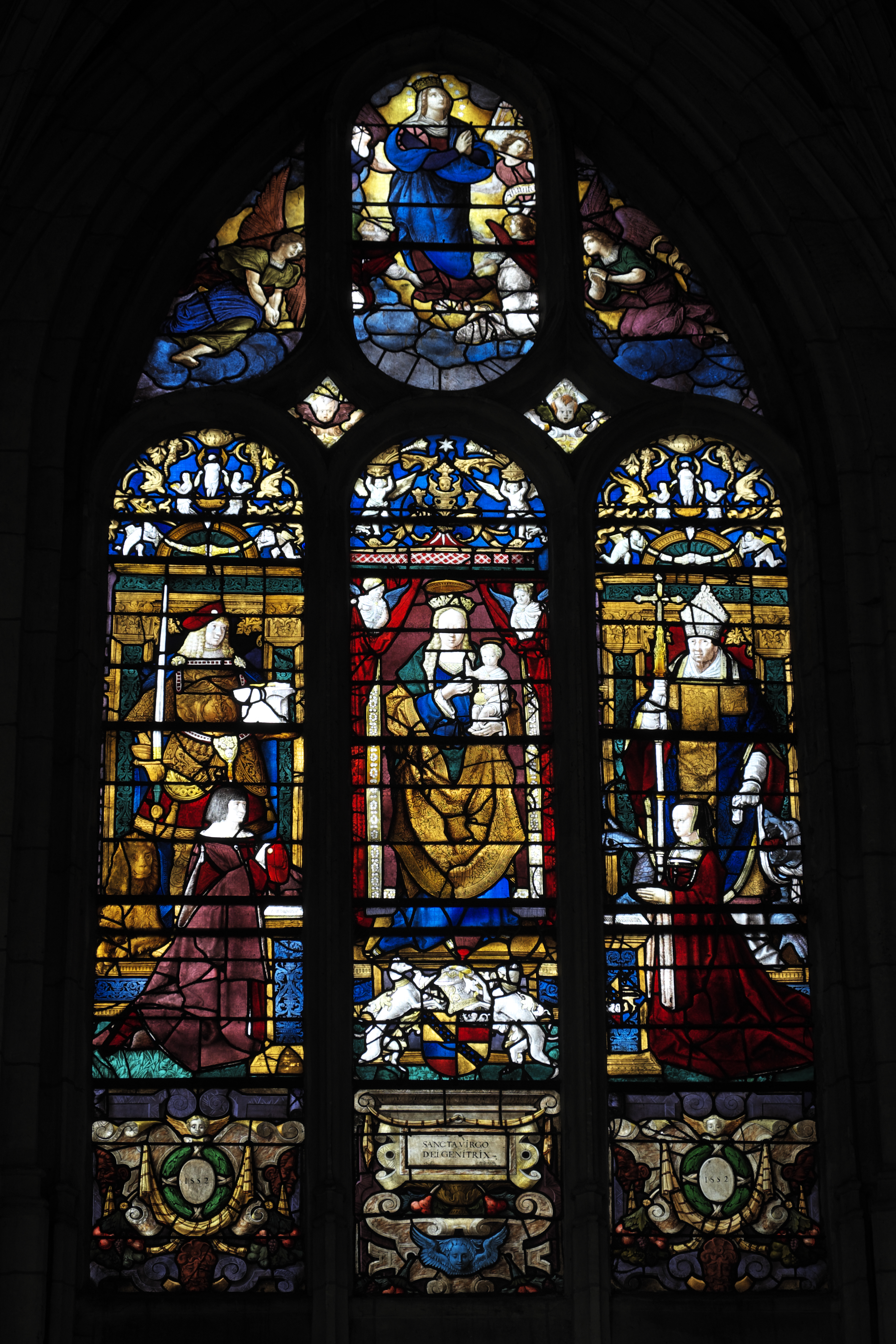 Katholische Kirche Sainte-Foy in Conches-en-Ouche im Département Eure (Haute-Normandie/Frankreich), Bleiglasfenster aus dem 16. Jahrhundert, mit der Jahreszahl 1552, Darstellung: Madonna mit Kind (Mitte), Saint Adrien (links), Saint Romain (rechts), Stifter (unten)